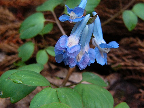 エゾエンゴクサ